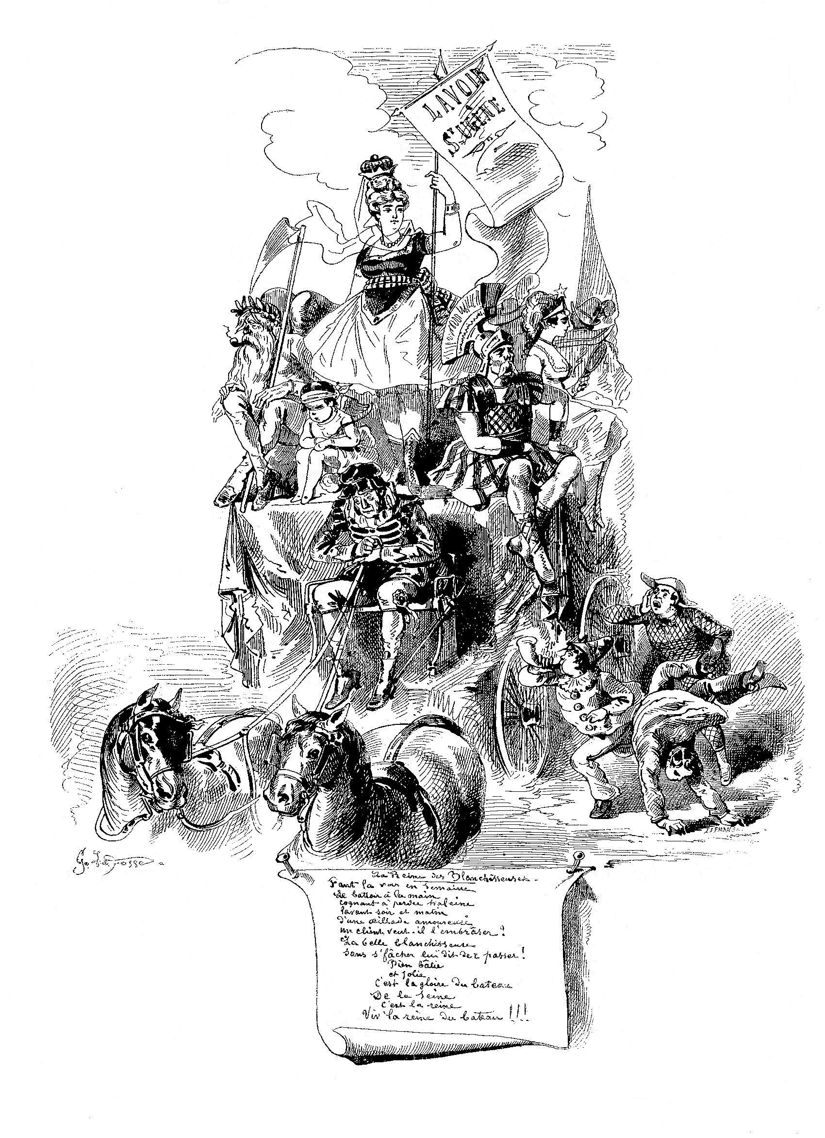 La Reine des blanchisseuses.